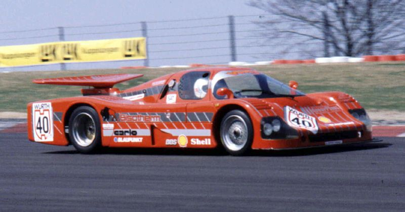 Sur une Sauber SEHCAR C6 en Supercup (1987)